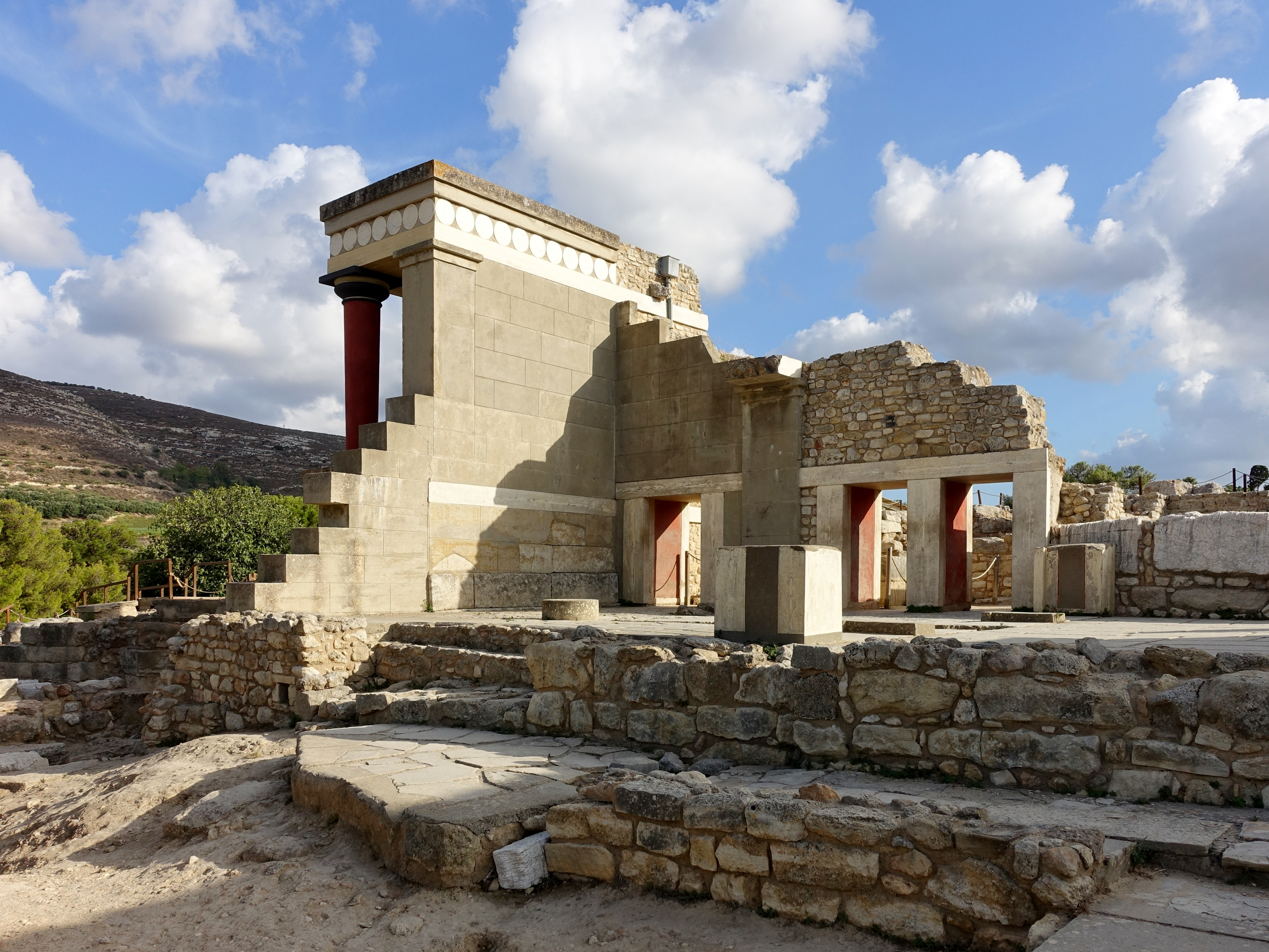 Westbastion in Knossos (Κνωσός), Kreta, Griechenland